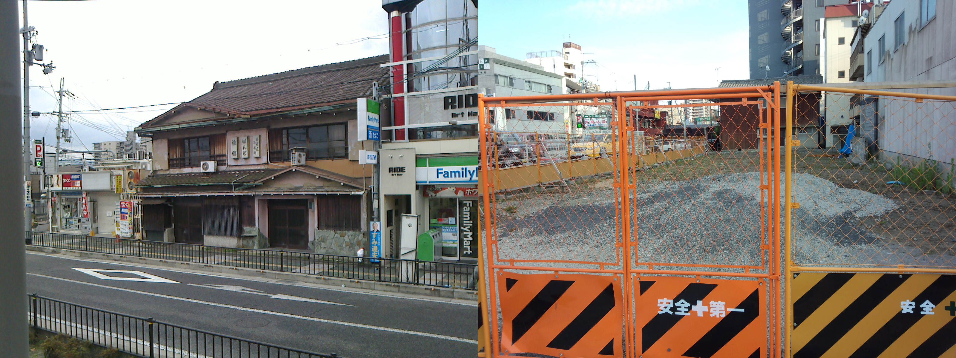 左: ばんど旅館(2014年12月12日撮影)。 右: ばんど旅館跡(2017年6月3日撮影)。